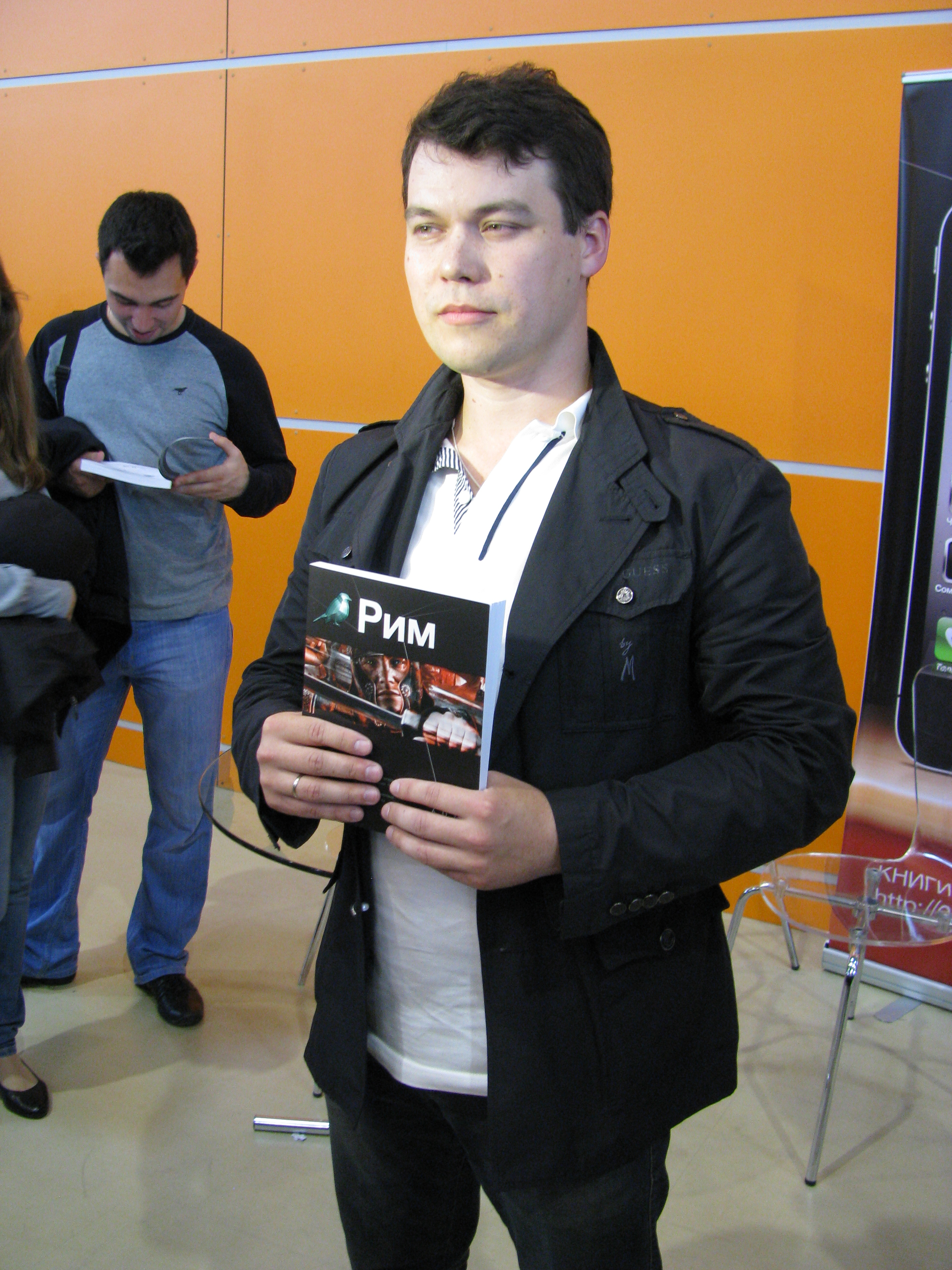 Шимун Врочек на ММКВЯ-2011